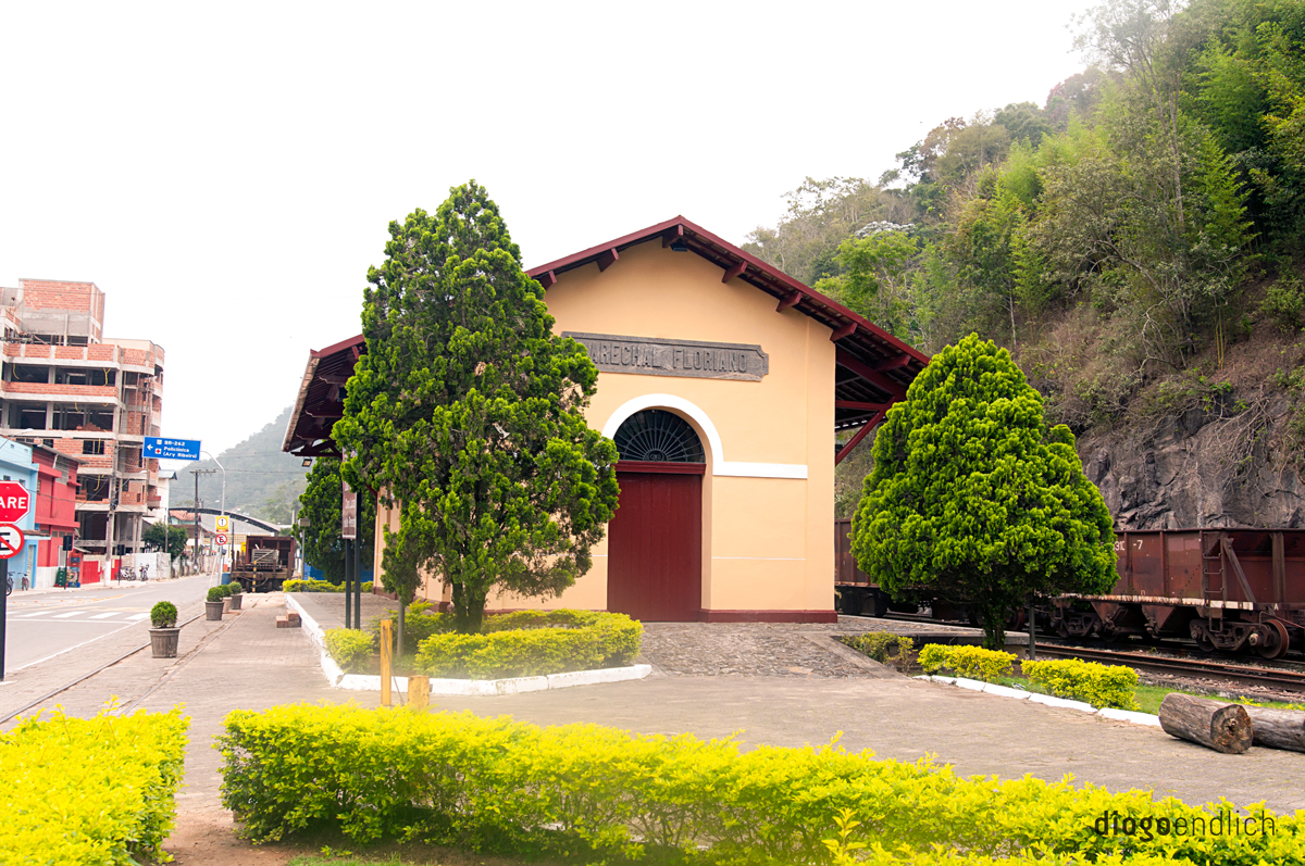 Estação ferroviária de Marechal Floriano ES